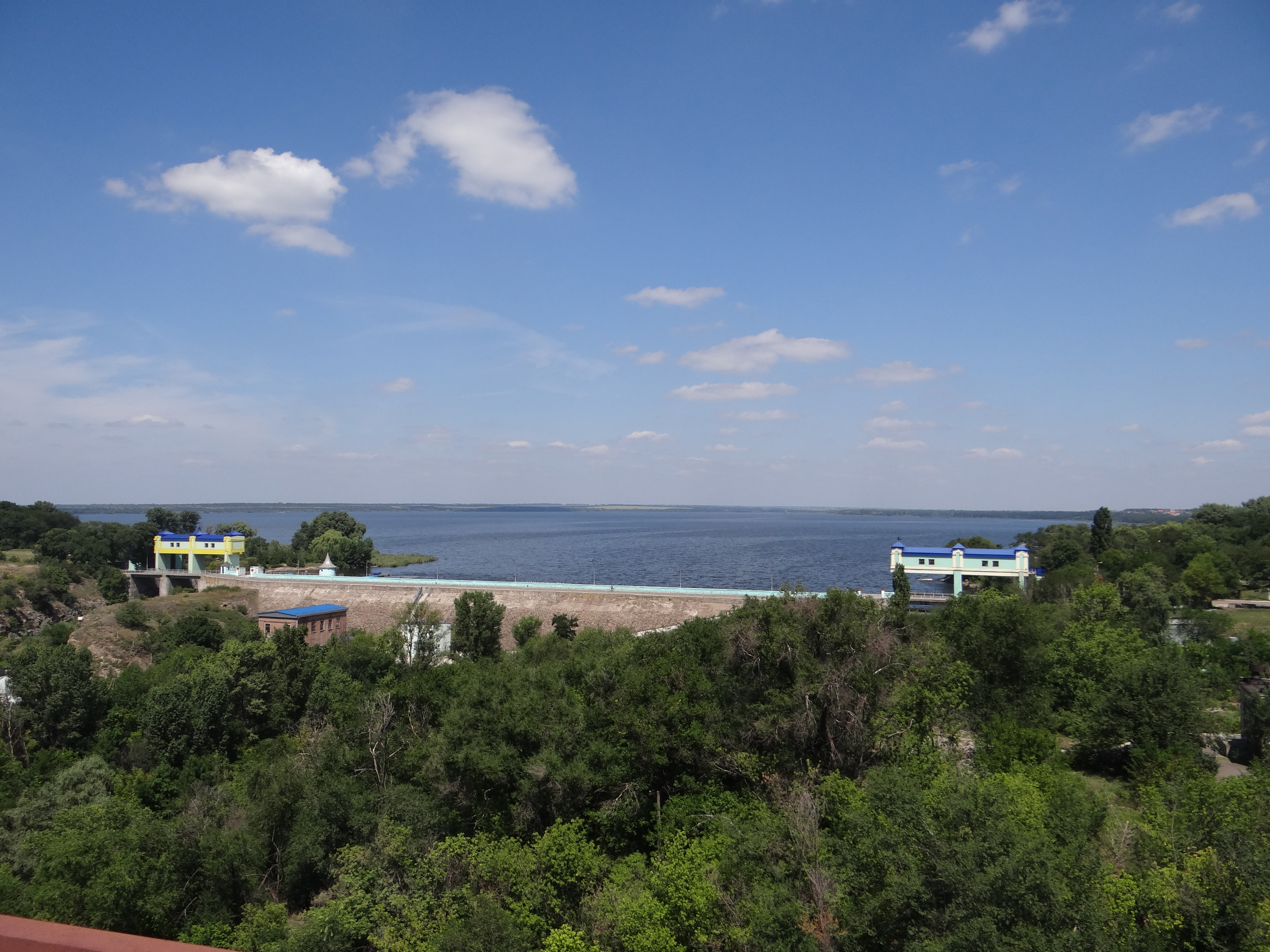 Карачунівське водосховище